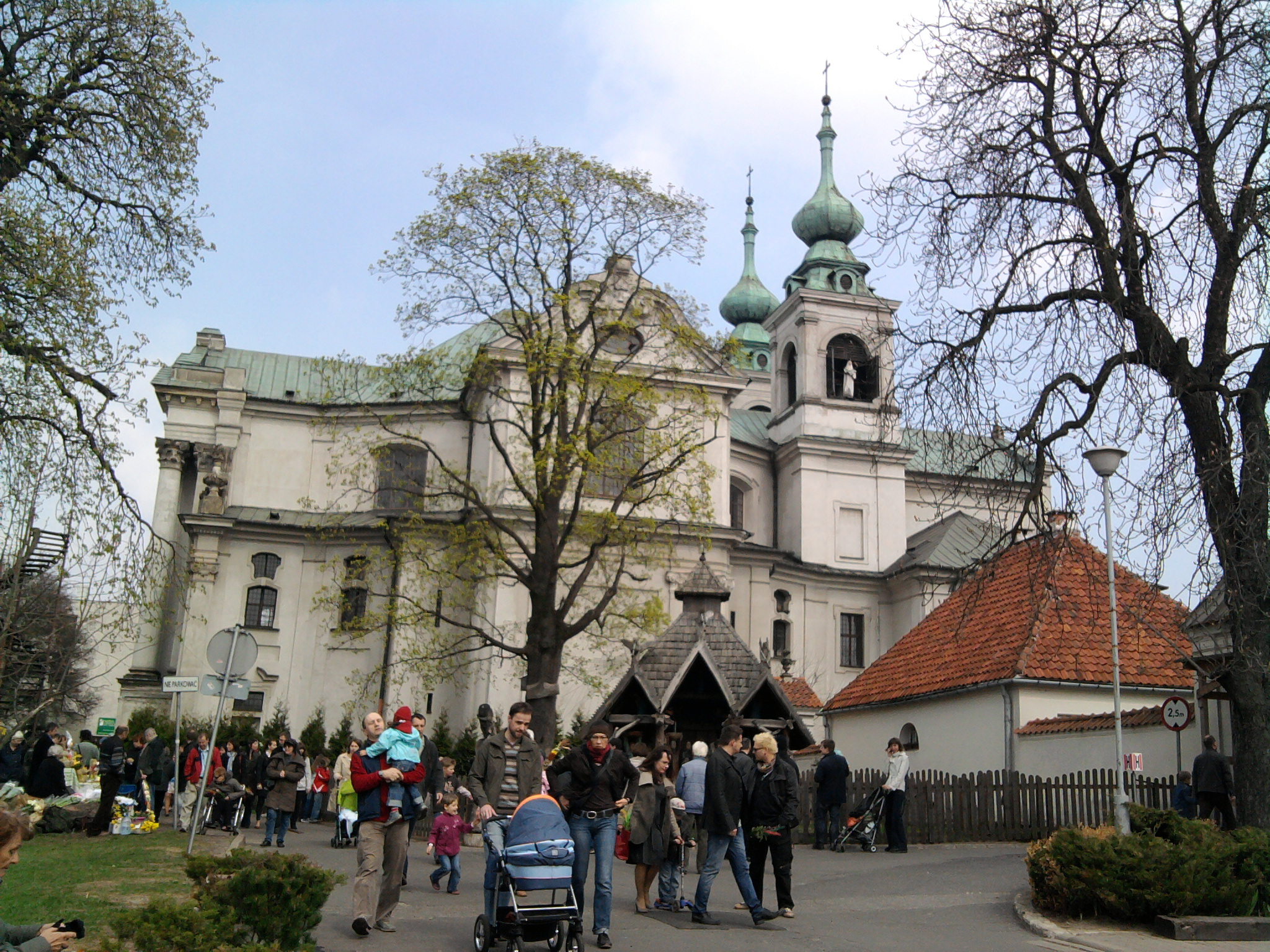 Warszawa, kościół pokamedulski na Bielanach